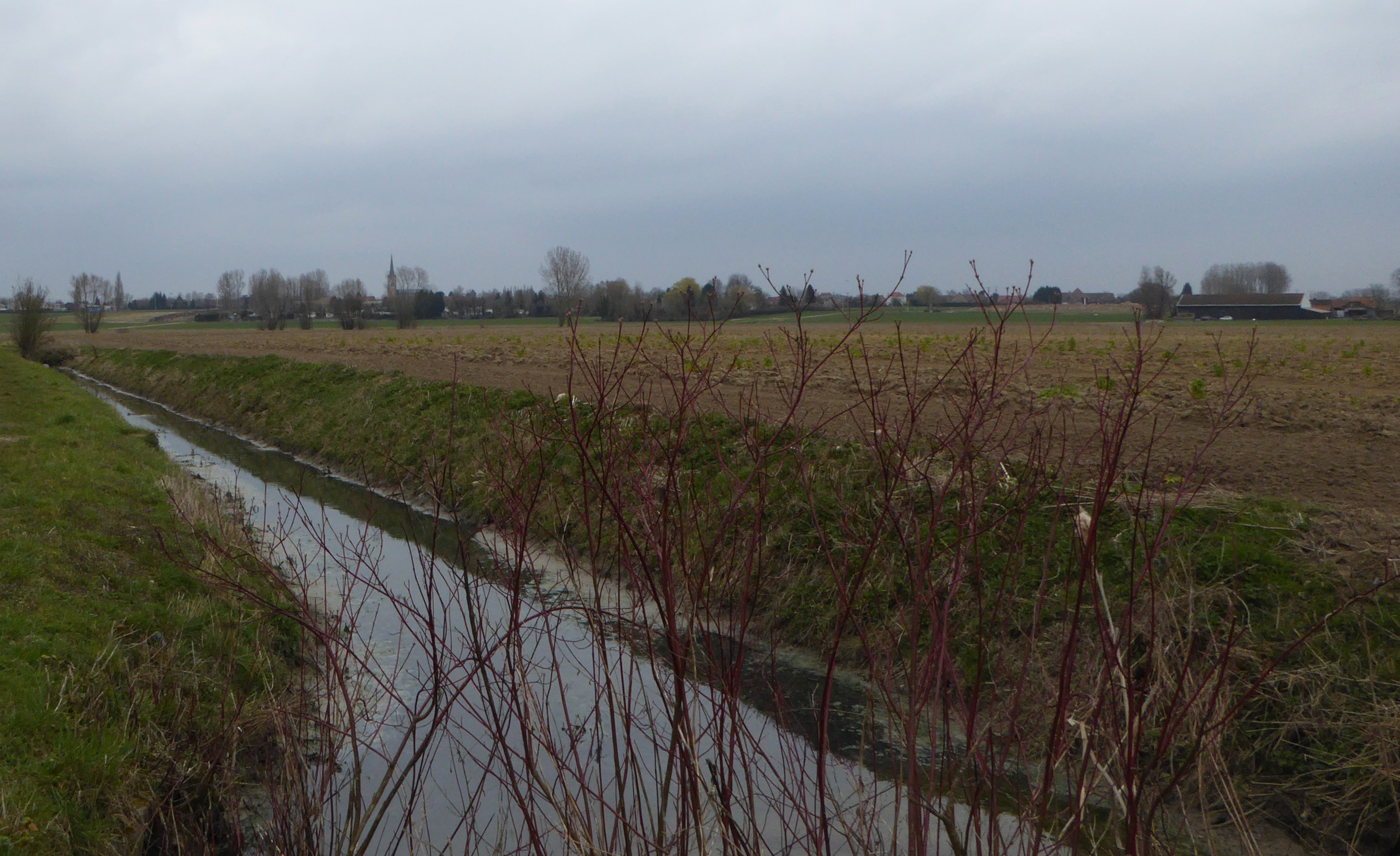 La Broëlle Herlies Nord Nord-Pas-de-Calais-Picardie France.